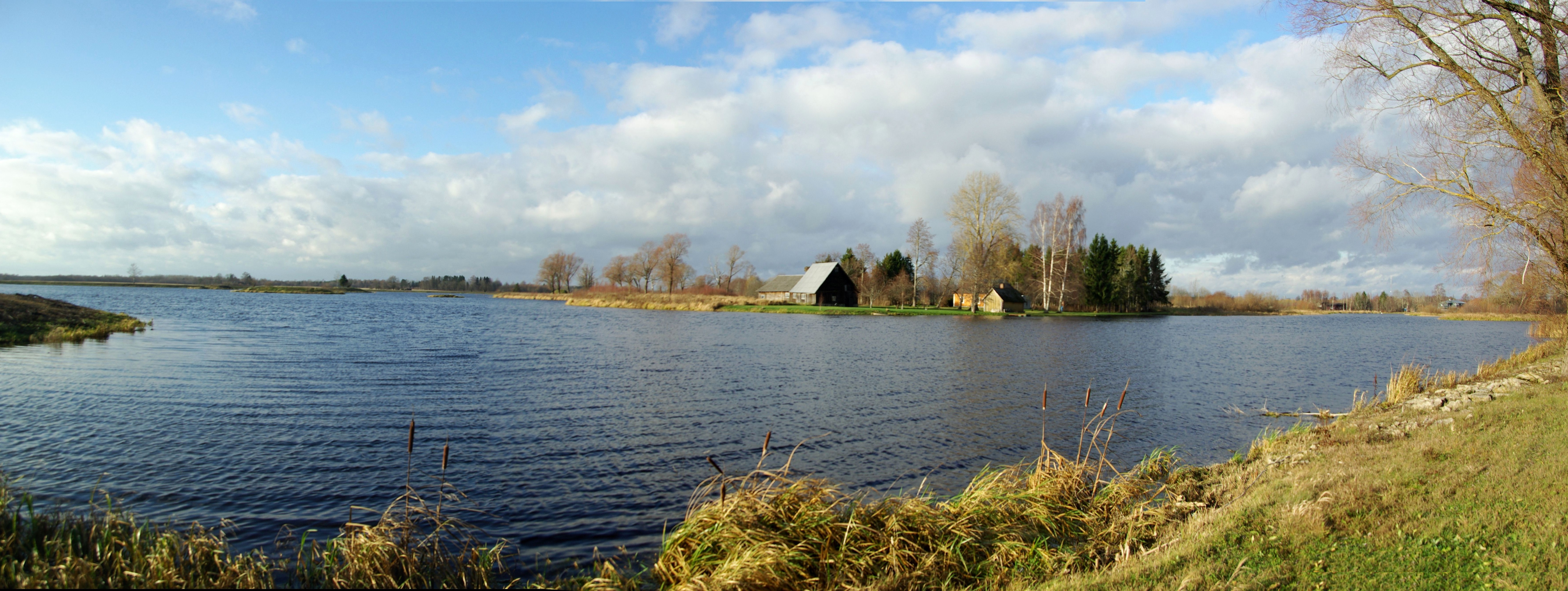 Kamari, Põltsamaa vald, Jõgeva maakond